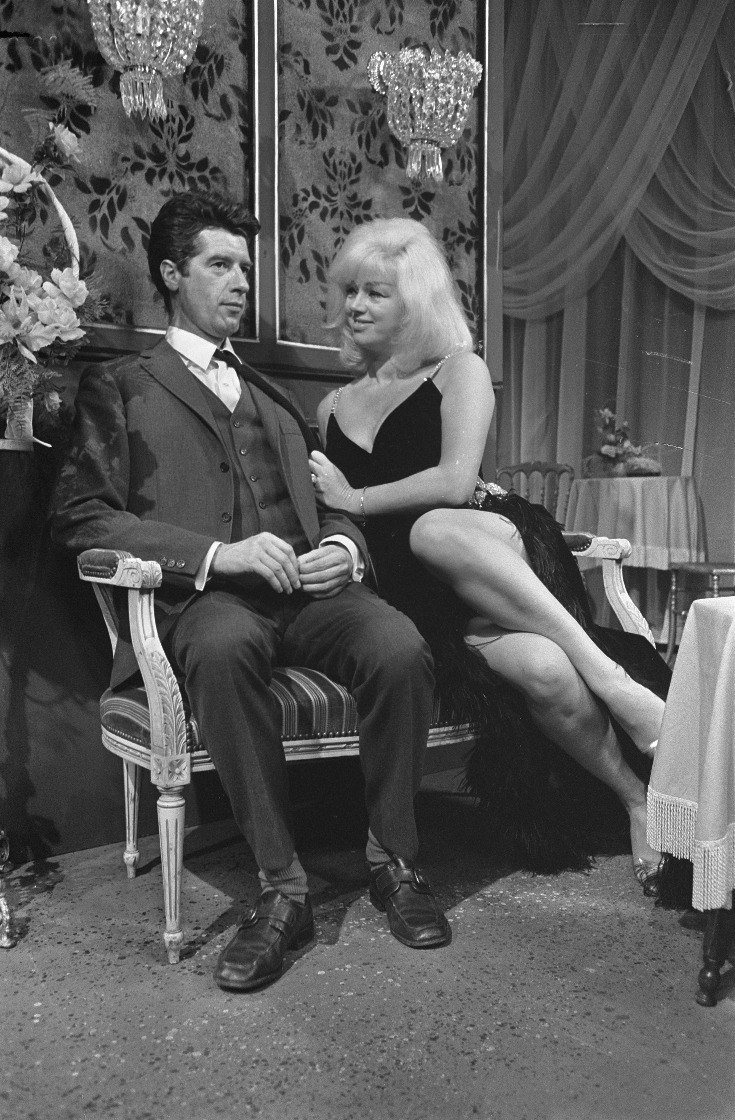 Collectie / Archief : Fotocollectie Anefo Reportage / Serie : Diana Dors in de Rudi Carrell show Beschrijving : Rudi Carrell en Diana Dors tijdens de repetitie van de show Annotatie : Diana Dors (1931-1984). Rudi Carrell (1934-2006) Datum : 19 oktober 1968 Locatie : Hilversum Trefwoorden : artiesten, televisieprogramma's Persoonsnaam : Carrell, Rudi, Dors, Diana Fotograaf : Fotograaf Onbekend / Anefo Auteursrechthebbende : Nationaal Archief Materiaalsoort : Negatief (zwart/wit) Nummer archiefinventaris : bekijk toegang 2.24.01.05 Bestanddeelnummer : 921-7797 Reacties Geplaatst door Maaike op 07 mei 2014 - 10:23. NB. Uitgezonden op 2 november 1968